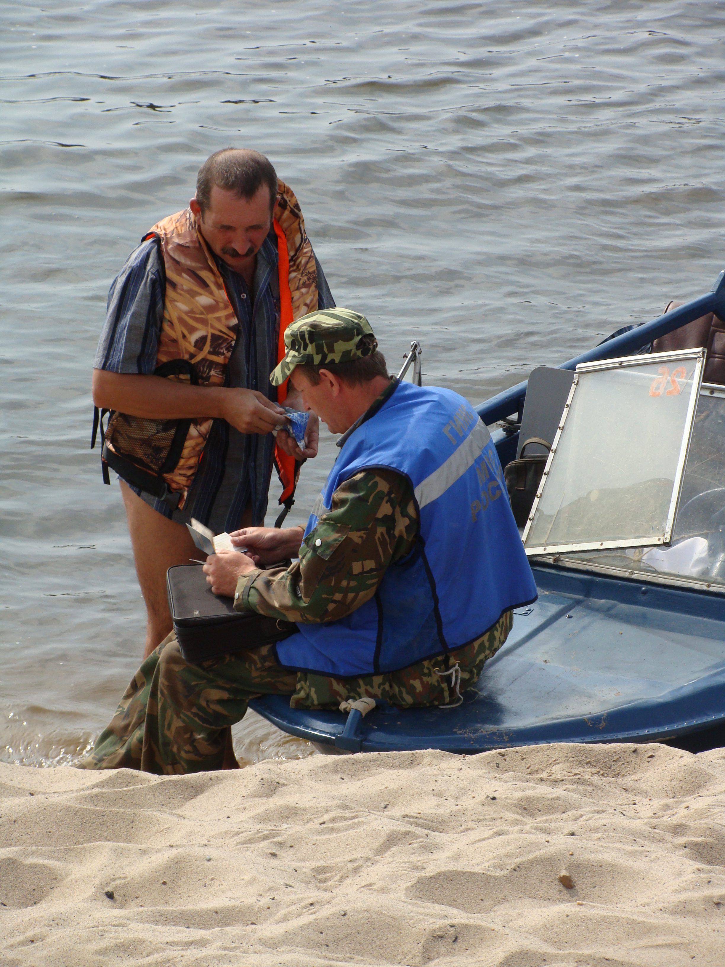 ГИМС р.Вычегда Сольвычегодск